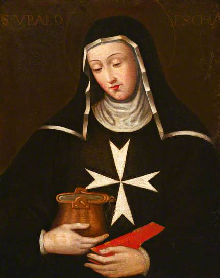 Santa Ubaldesca Taccini Olio su tela presso St John's Gate, Londra